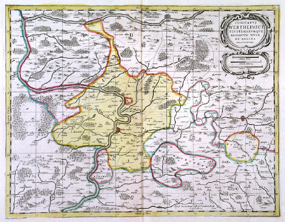 Karte der Grafschaft Wertheim nach Johannes Janssonius